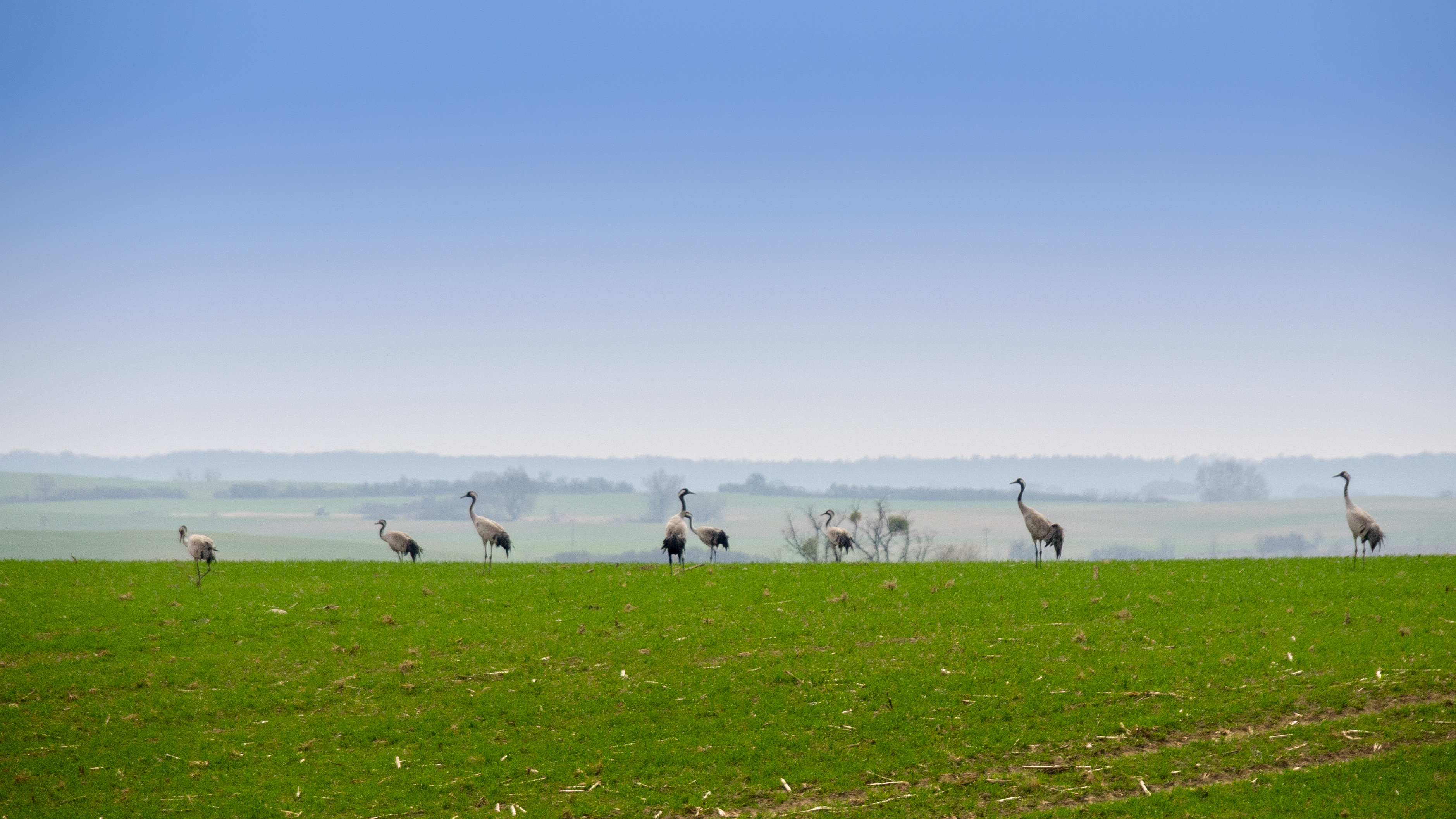 Kraniche auf Futtersuche im Naturschutzgebiet Eulenberge (Uckermark)